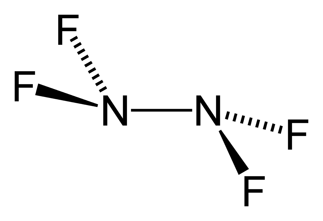 Structural formula of tetrafluorohydrazine, N2F4